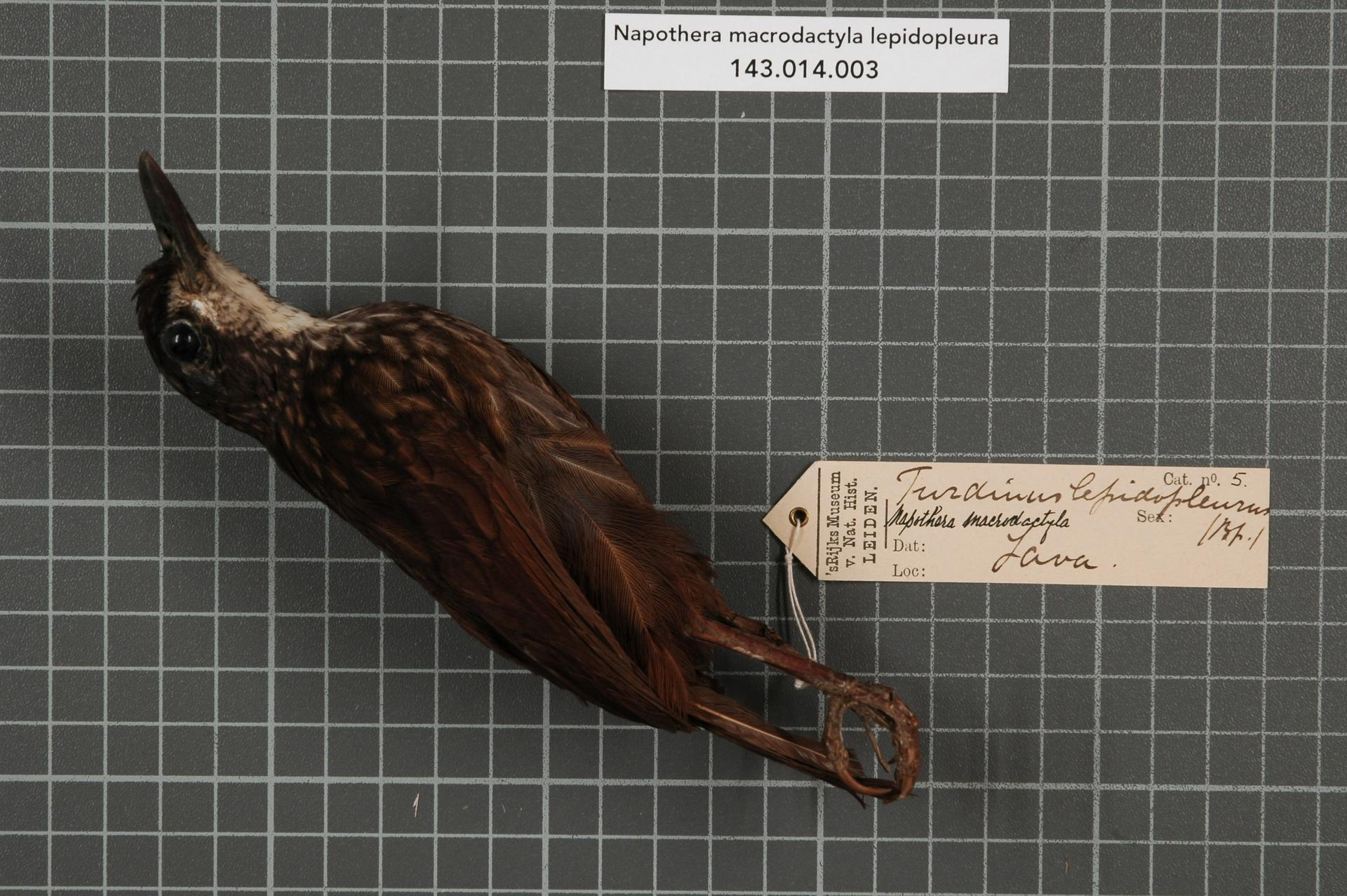 Napothera macrodactyla lepidopleura (Bonaparte, 1850)